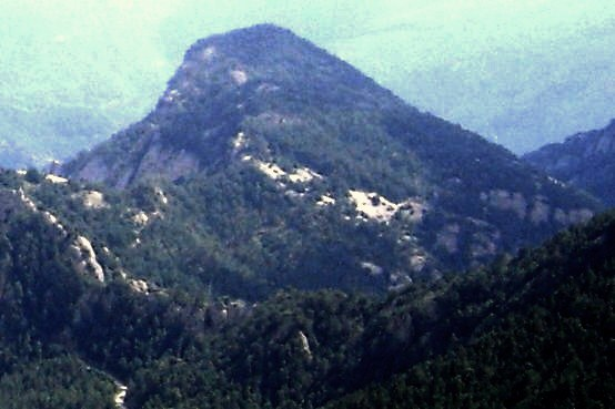 El vessant nord-occidental del Tossal de Vall-llonga (Vall de Lord).